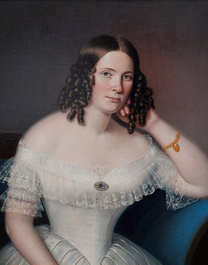 Ольга Николаевна Скобелева (1823-1880), дочь Н.П.Полтавцева от брака с Д.А.Пашковой, была замужем за генералом Д.И.Скобелевым, мать генерала М.Д.Скобелева.